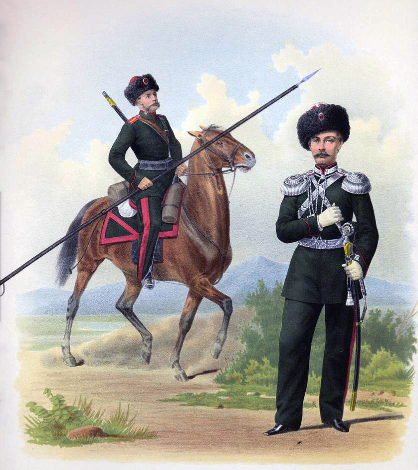 Казак и Штаб-Офицер Семиреченского Казачьего войска, 18 июля 1867. (Парадная форма).